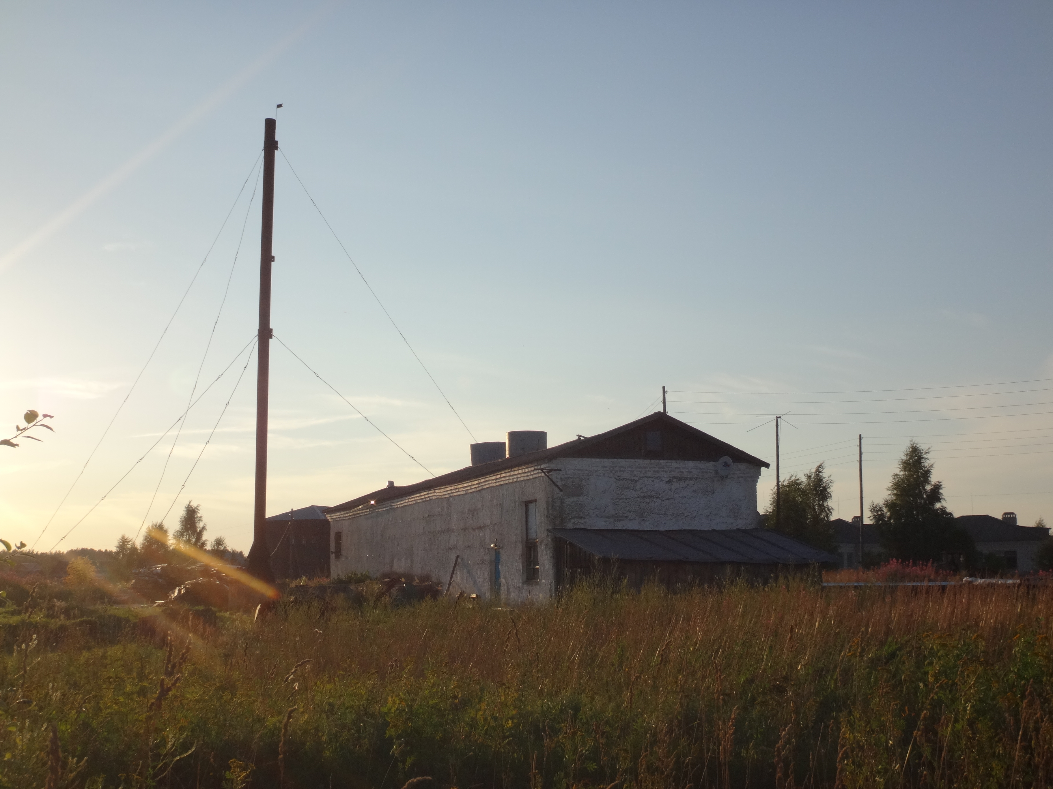 Котельная. Дымовая труба на оттяжках